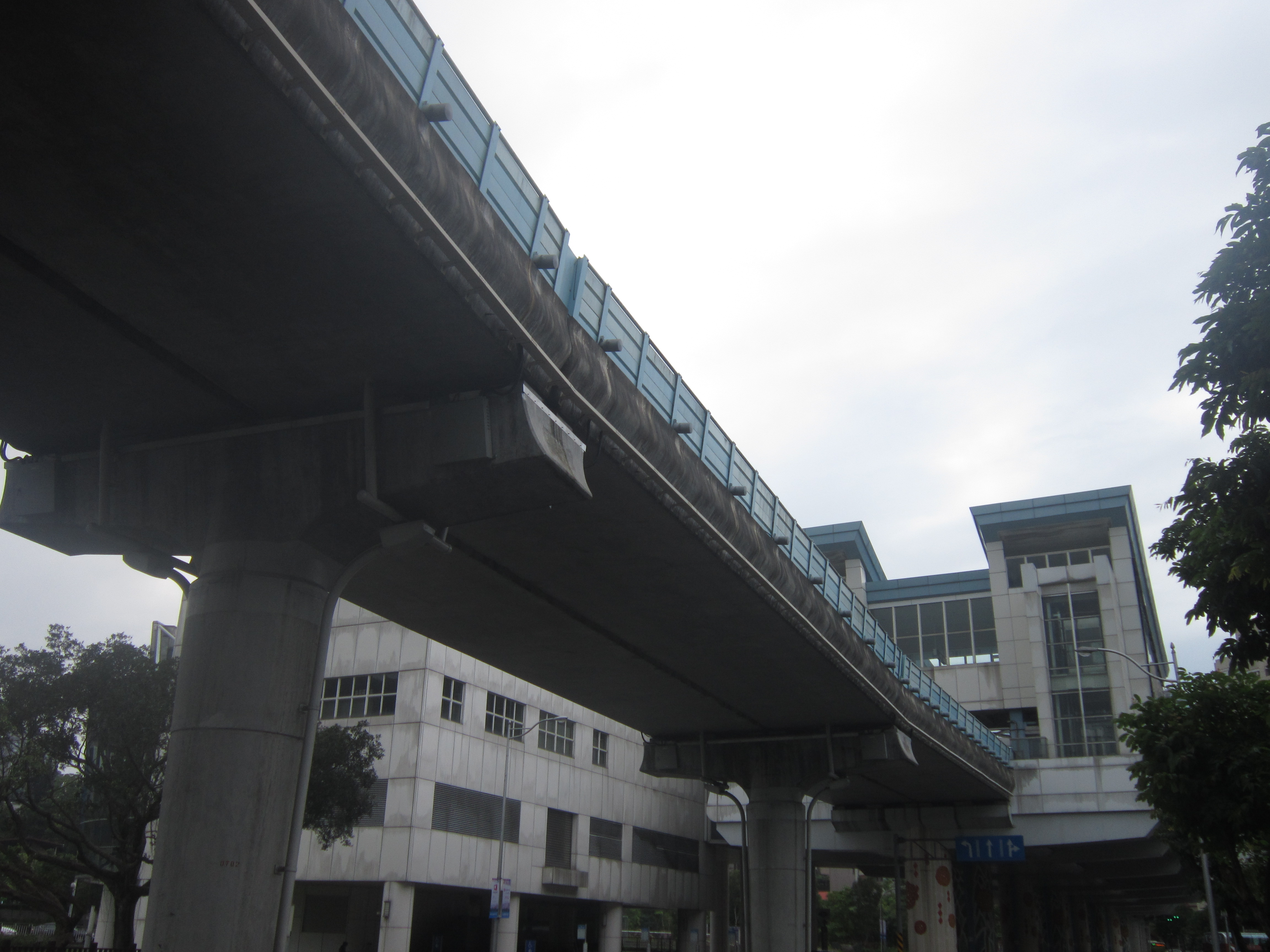 大湖公園捷運站一景